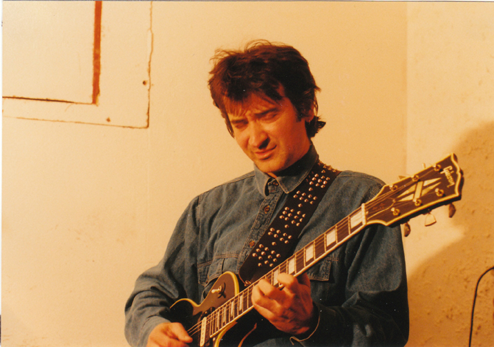 Аутор: Саша Костић Тома Ракијаш Licensing